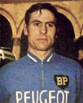 Jacques Esclassan (1974), 'Sprint 74', Panini figurina n°164.